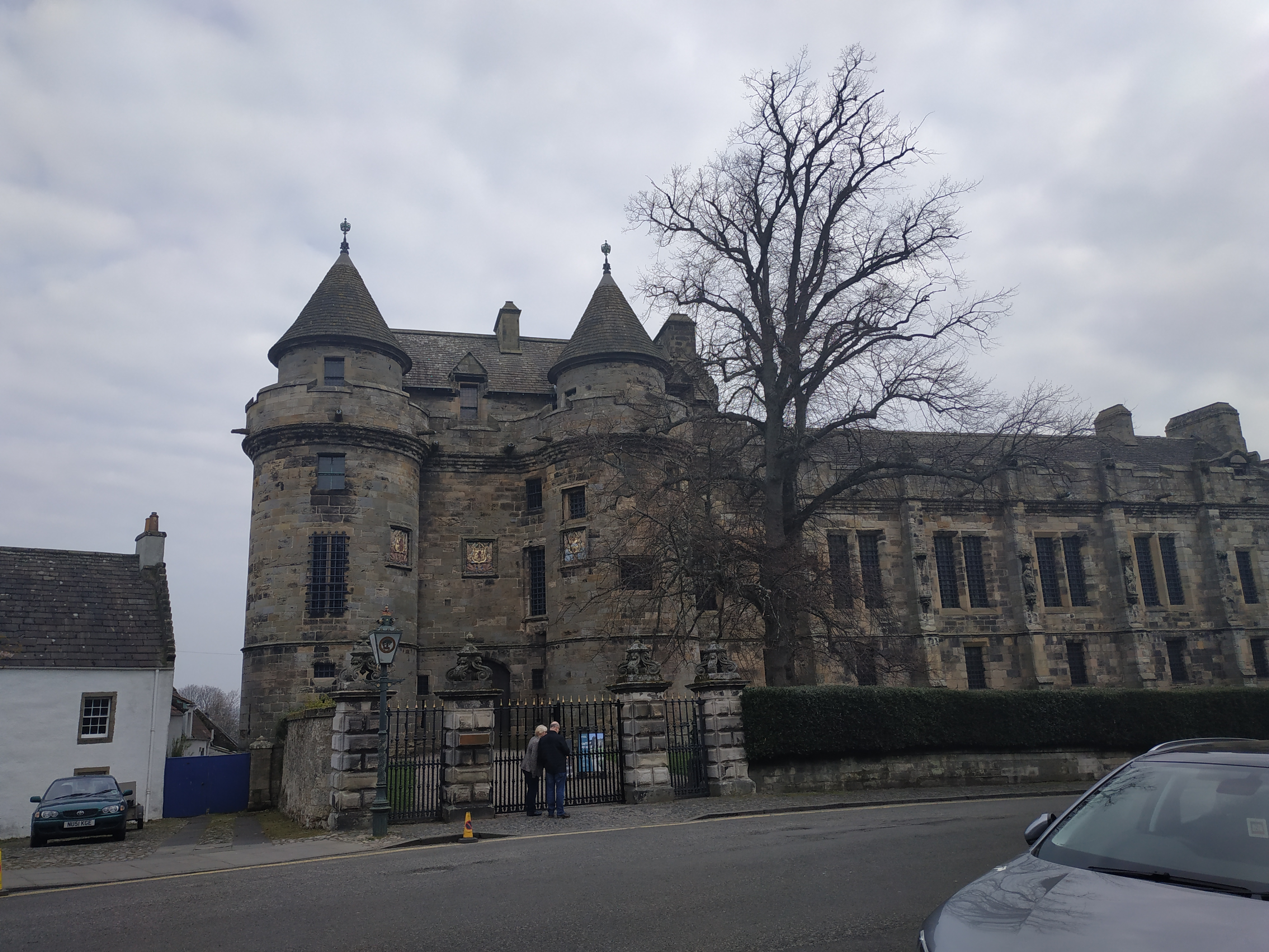 Pueblo Falkland, Fife, Escocia.